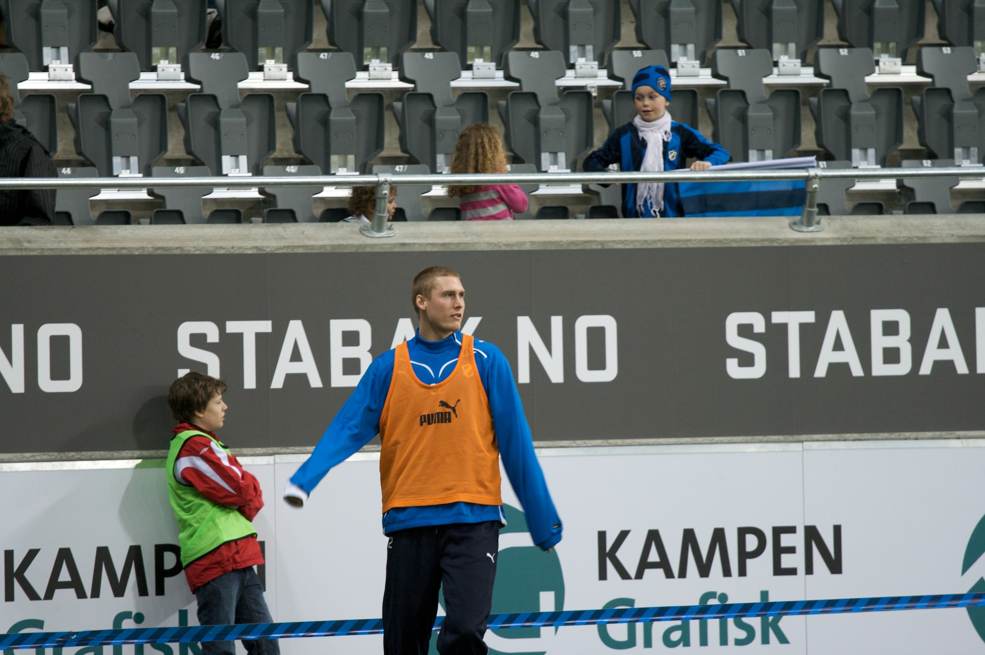 Iven Austbø i oppvarming